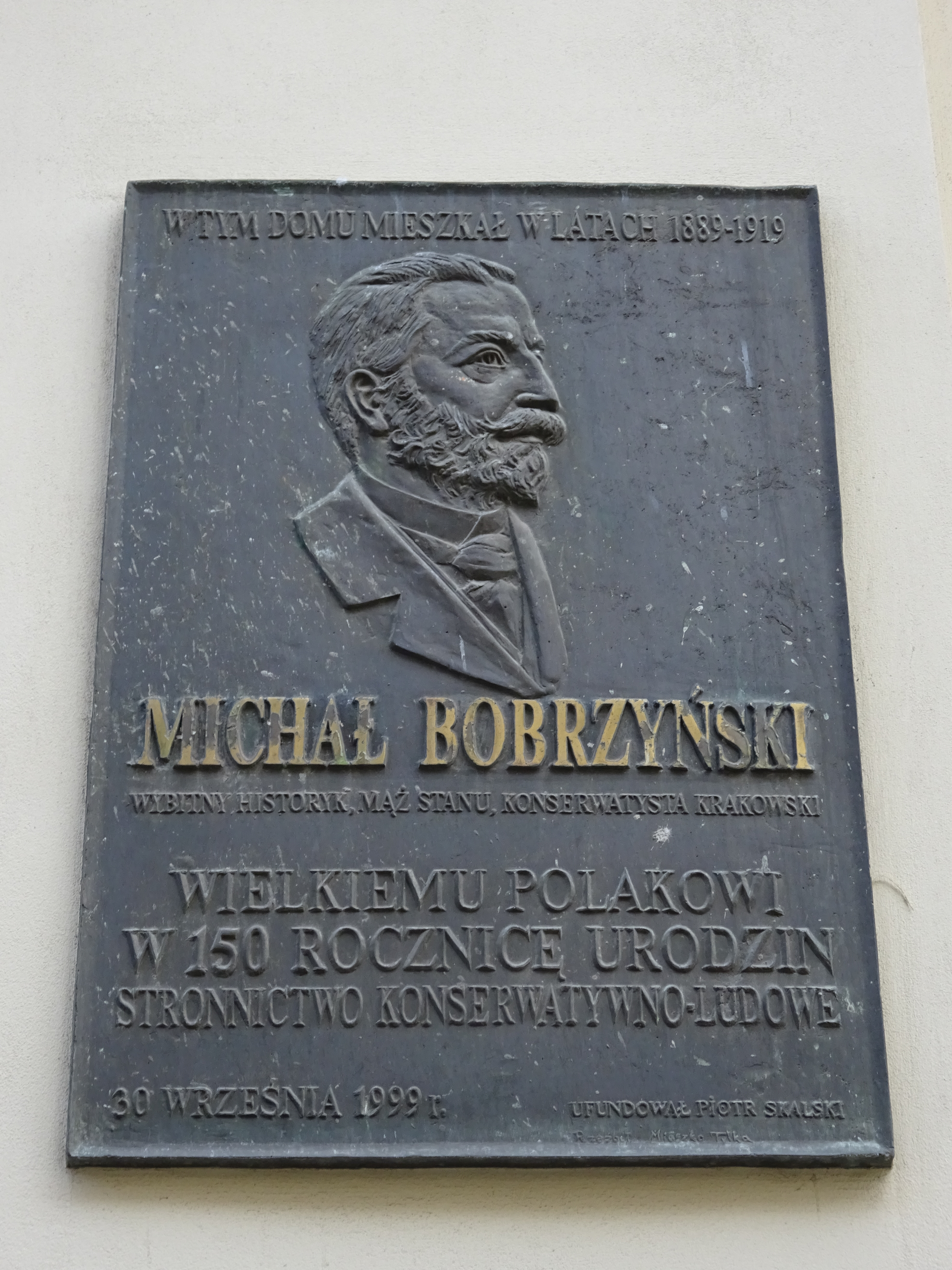 Ulica Krupnicza 9 - tablica upamiętniająca zamieszkiwanie owej kamienicy przez Michała Bobrzyńskiego w latach 1889-1919. Kraków, 2017.